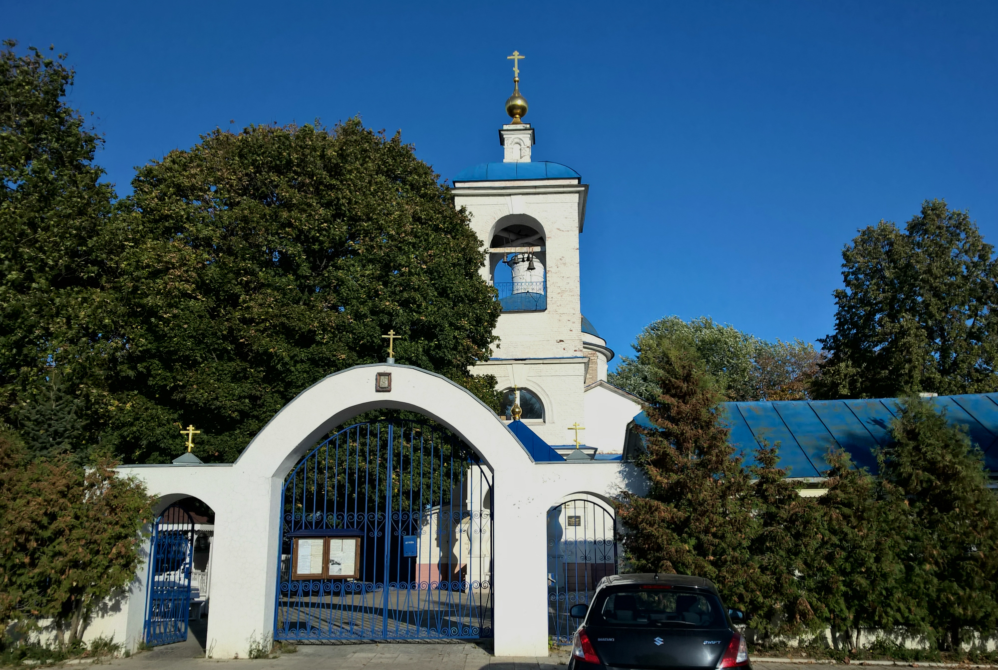 Церковь Димитрия Солунского: Малахово, Раменский район, Московская область